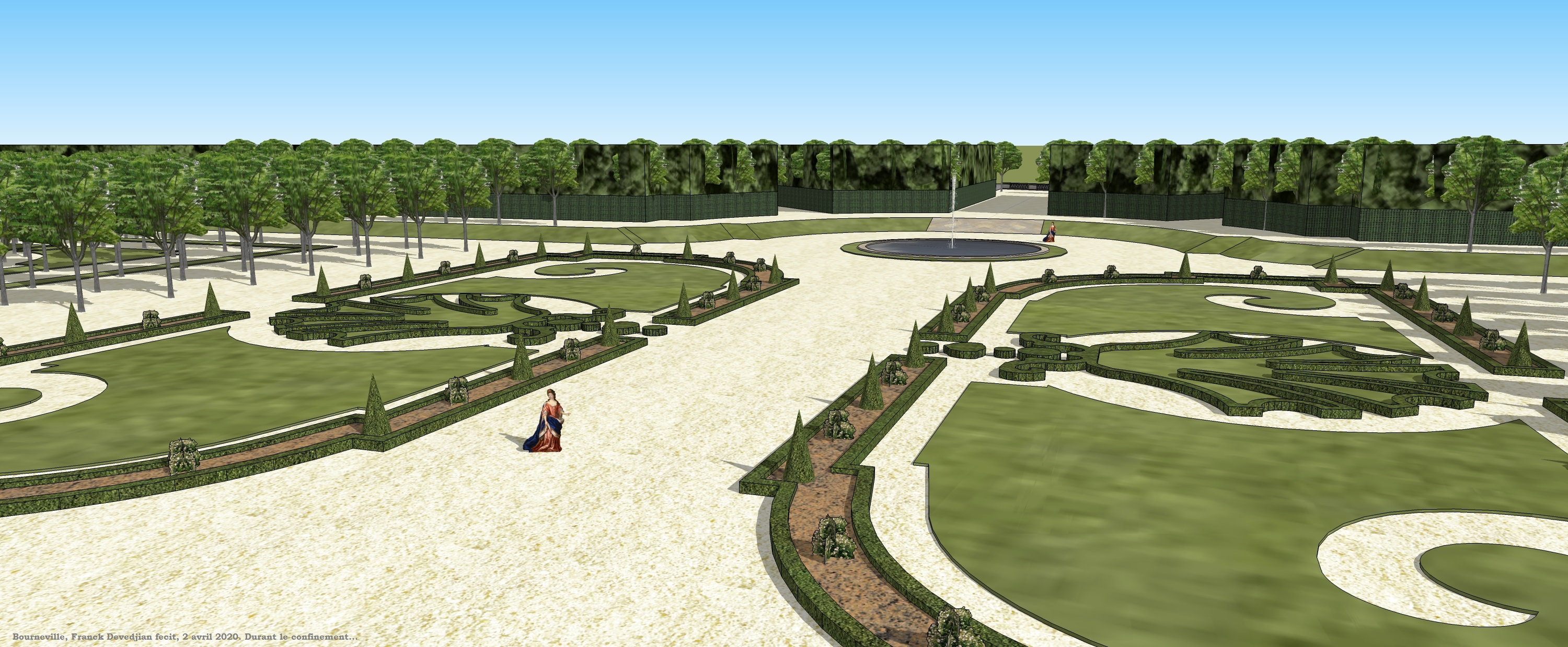 Restitution du château de Bourneville, XVIIIe siècle.